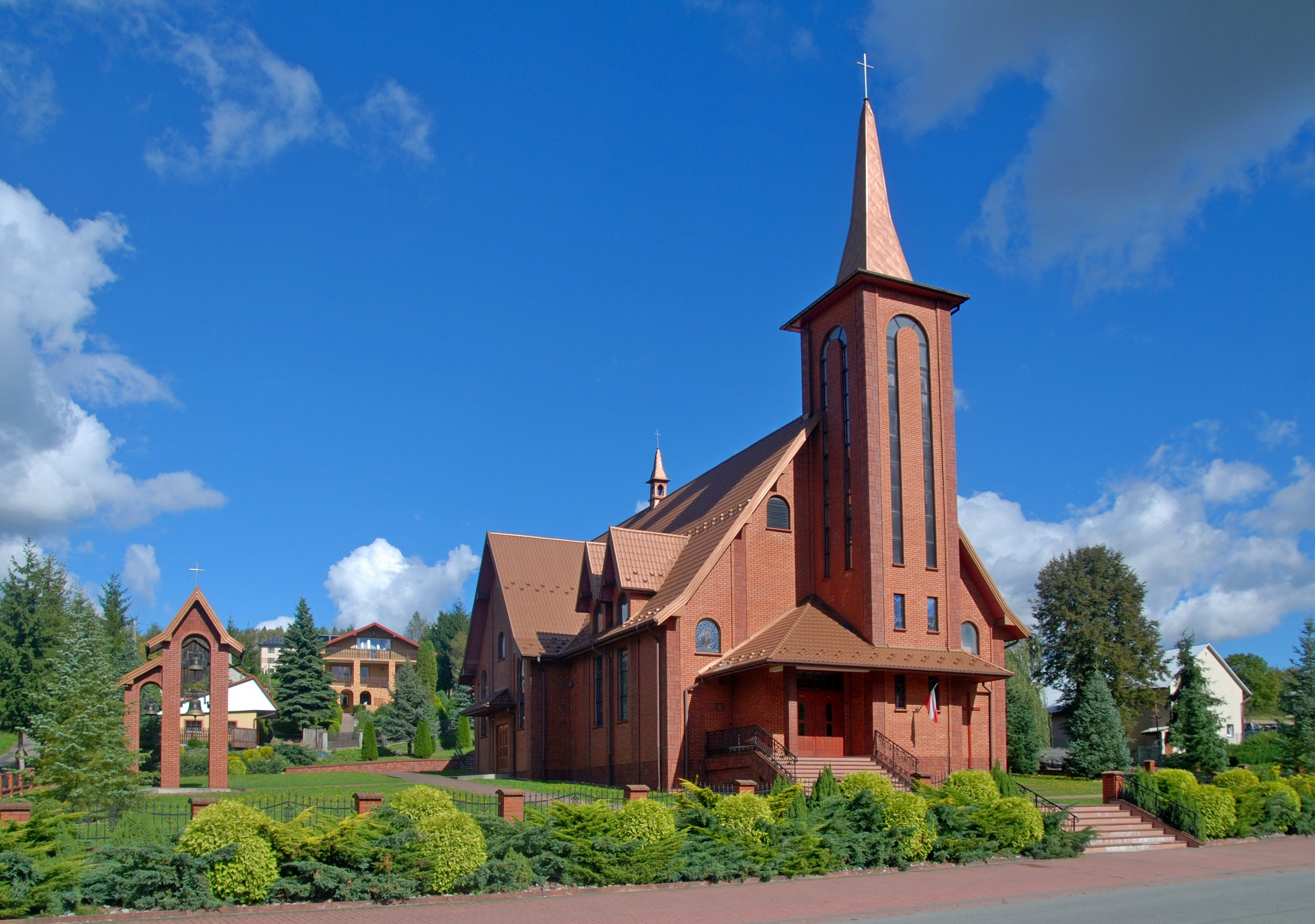 wieś Jabłonica (województwo podkarpackie)